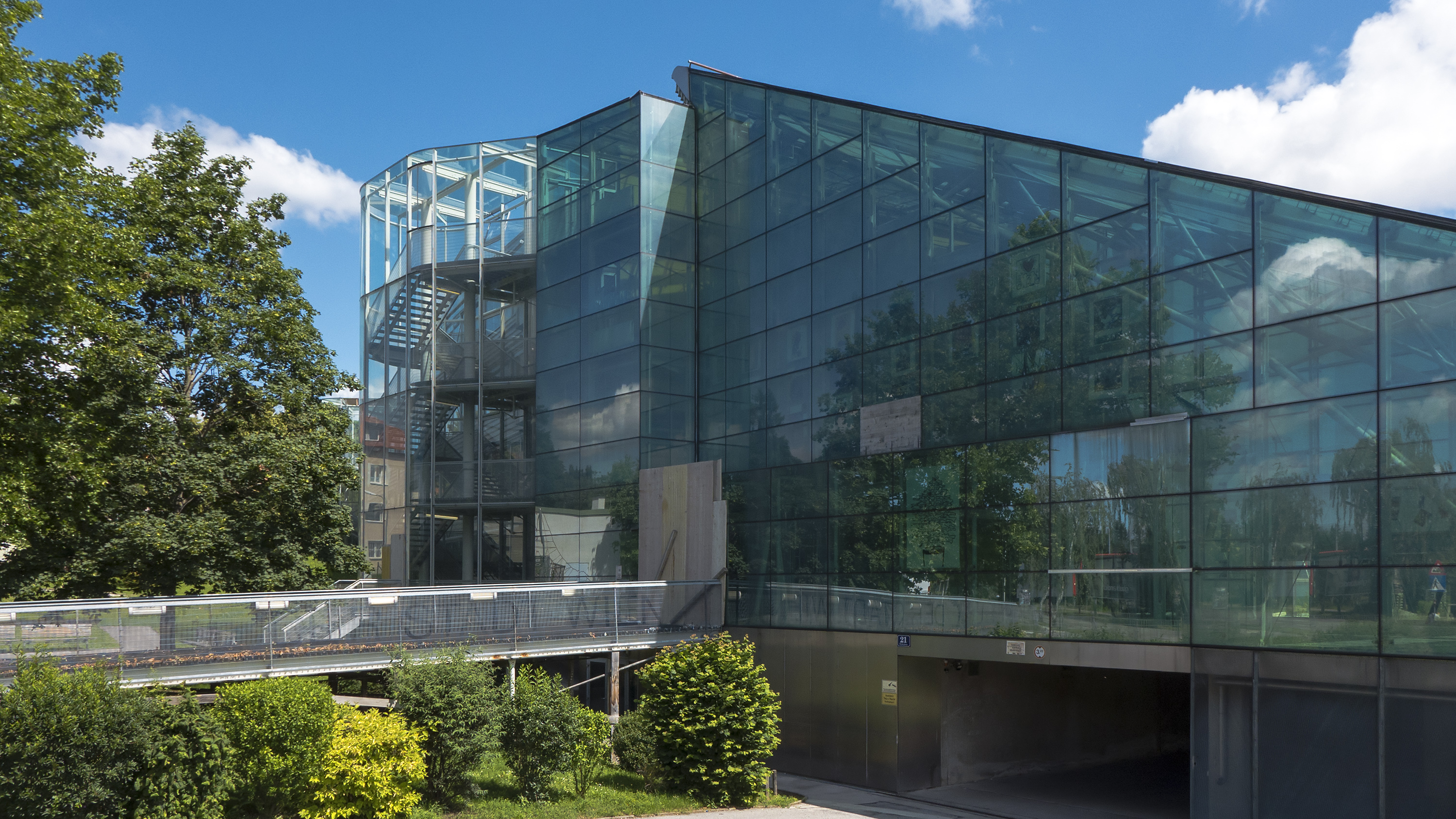 Ehemalige Informatikmittelschule Kinkplatz in Wien 14